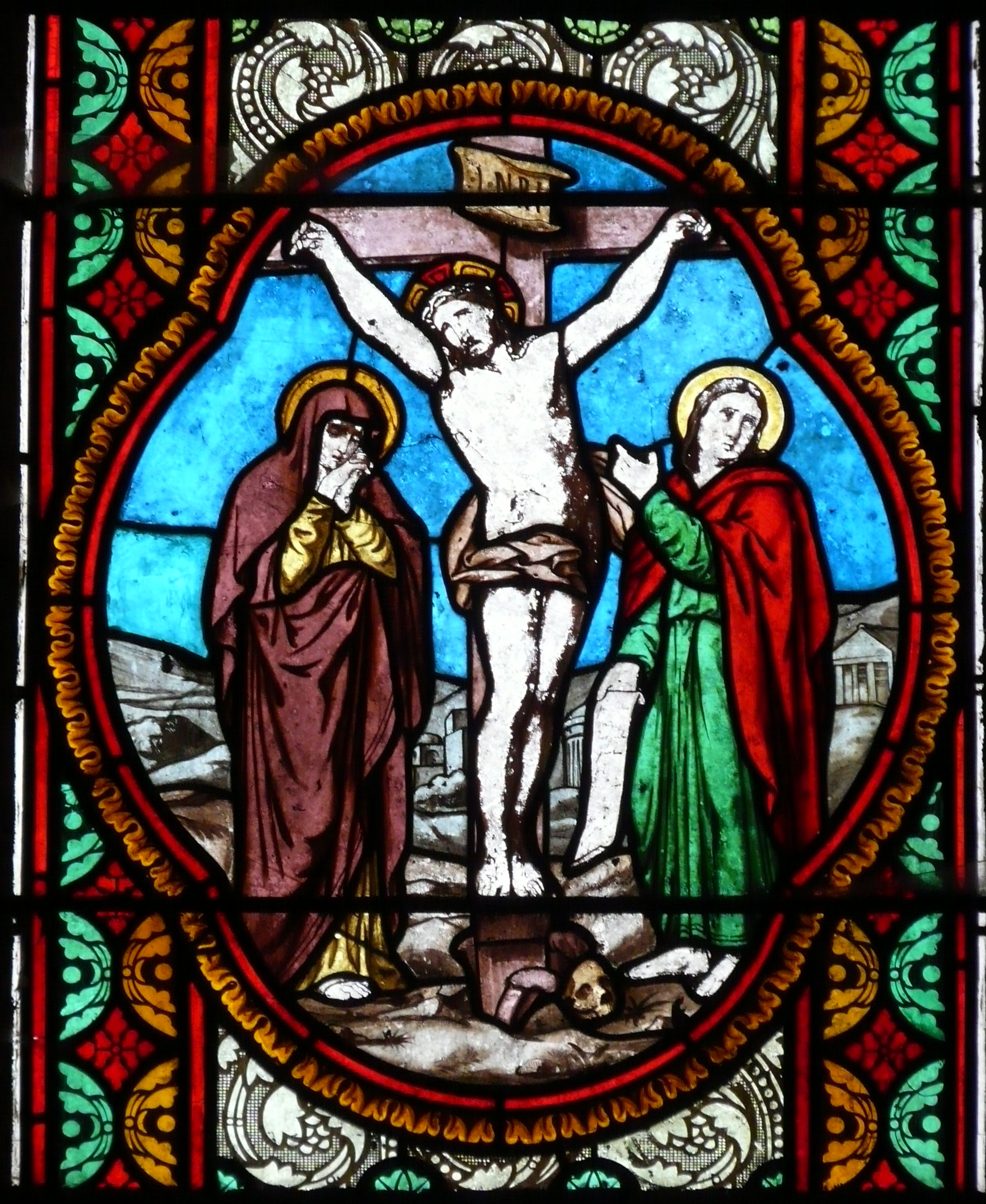 Détail d'un vitrail représentant Marie à côté de Jésus sur la croix, église Saint-Pierre-ès-Liens de Montrem, Dordogne, France.